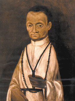 pintura anónima existente en el Monasterio de Santa Rosa de las Monjas de Lima